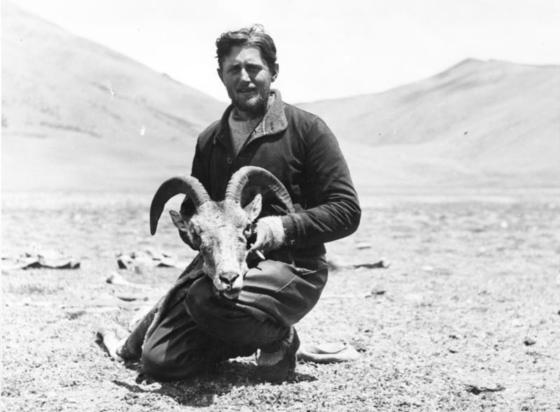 Tibetexpedition, Geer mit Argali Kiang, Wildaufnahmen: Geer mit Argali [Erlegtes Argali]